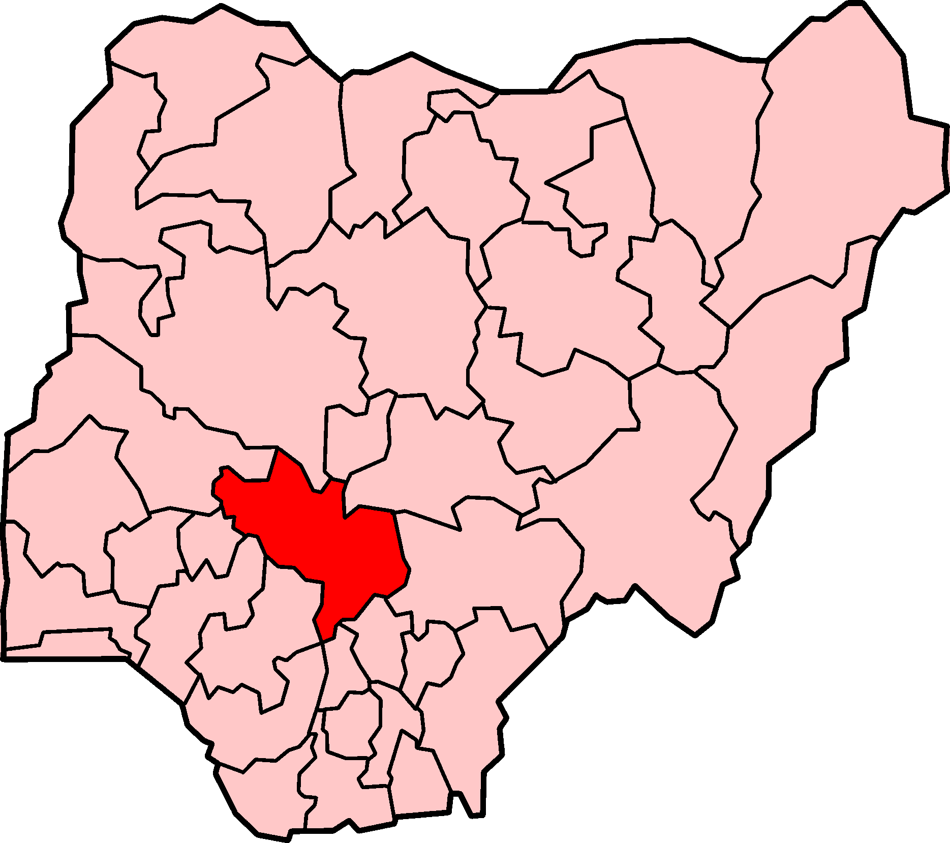 Localização do estado de Kogi na Nigéria.